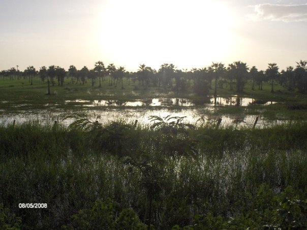 ESTADO GUARICO MUNICIPIO CAMAGUAN